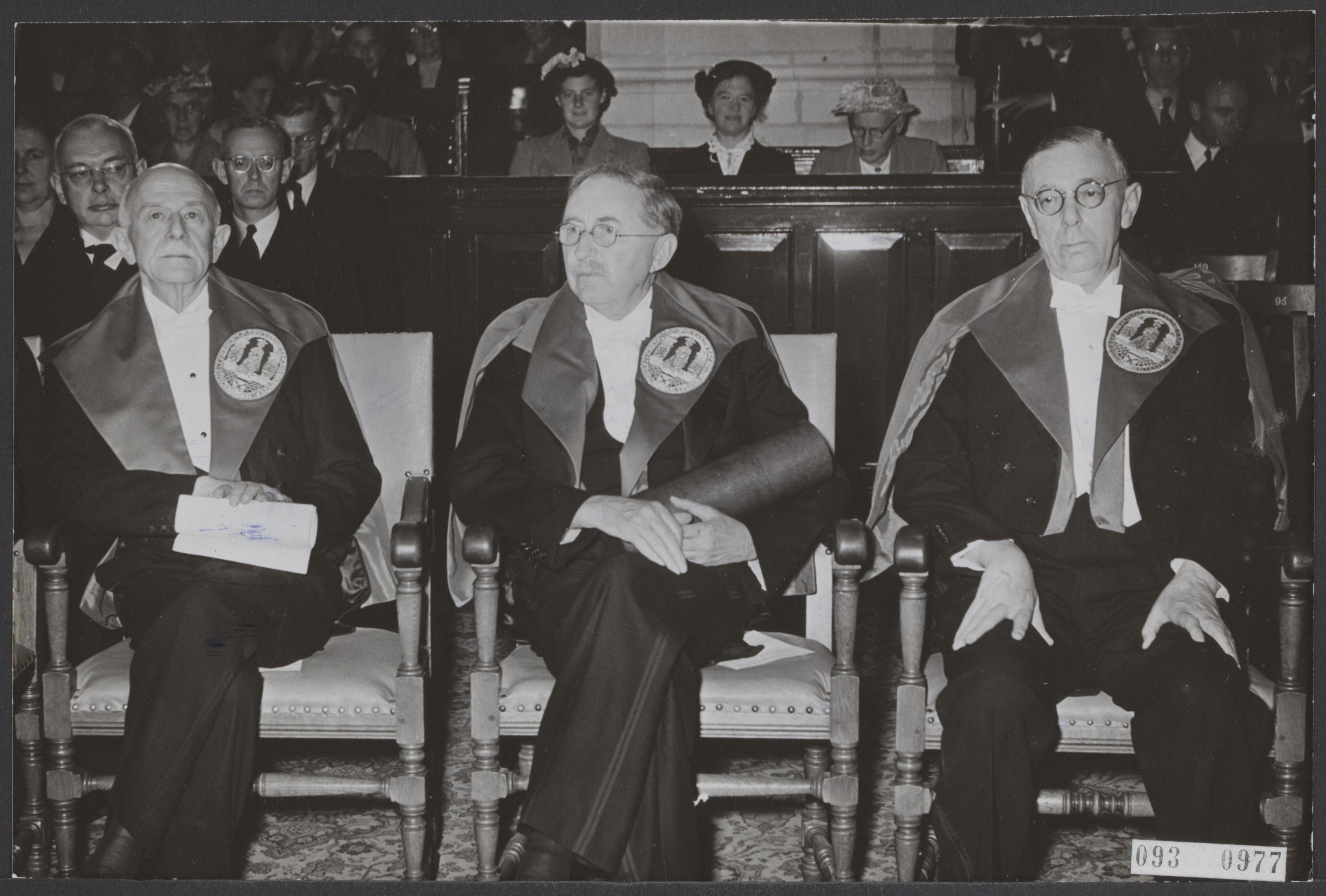 Collectie / Archief : Fotocollectie Elsevier Reportage / Serie : [ onbekend ] Beschrijving : auteurs, eredoctoraten, kostuums, Forster E.M., Schlumberger J., Vriesland, V. E van Datum : 23 juni 1954 Locatie : Leiden, Zuid-Holland Trefwoorden : auteurs, eredoctoraten, kostuums Persoonsnaam : Forster E.M., Schlumberger J., Vriesland, V. E van Instellingsnaam : Sint-Pieterskerk Fotograaf : Fotograaf Onbekend / Anefo Auteursrechthebbende : Nationaal Archief Materiaalsoort : Foto (zwart/wit) Nummer archiefinventaris : bekijk toegang 2.24.05.02 Bestanddeelnummer : 093-0977